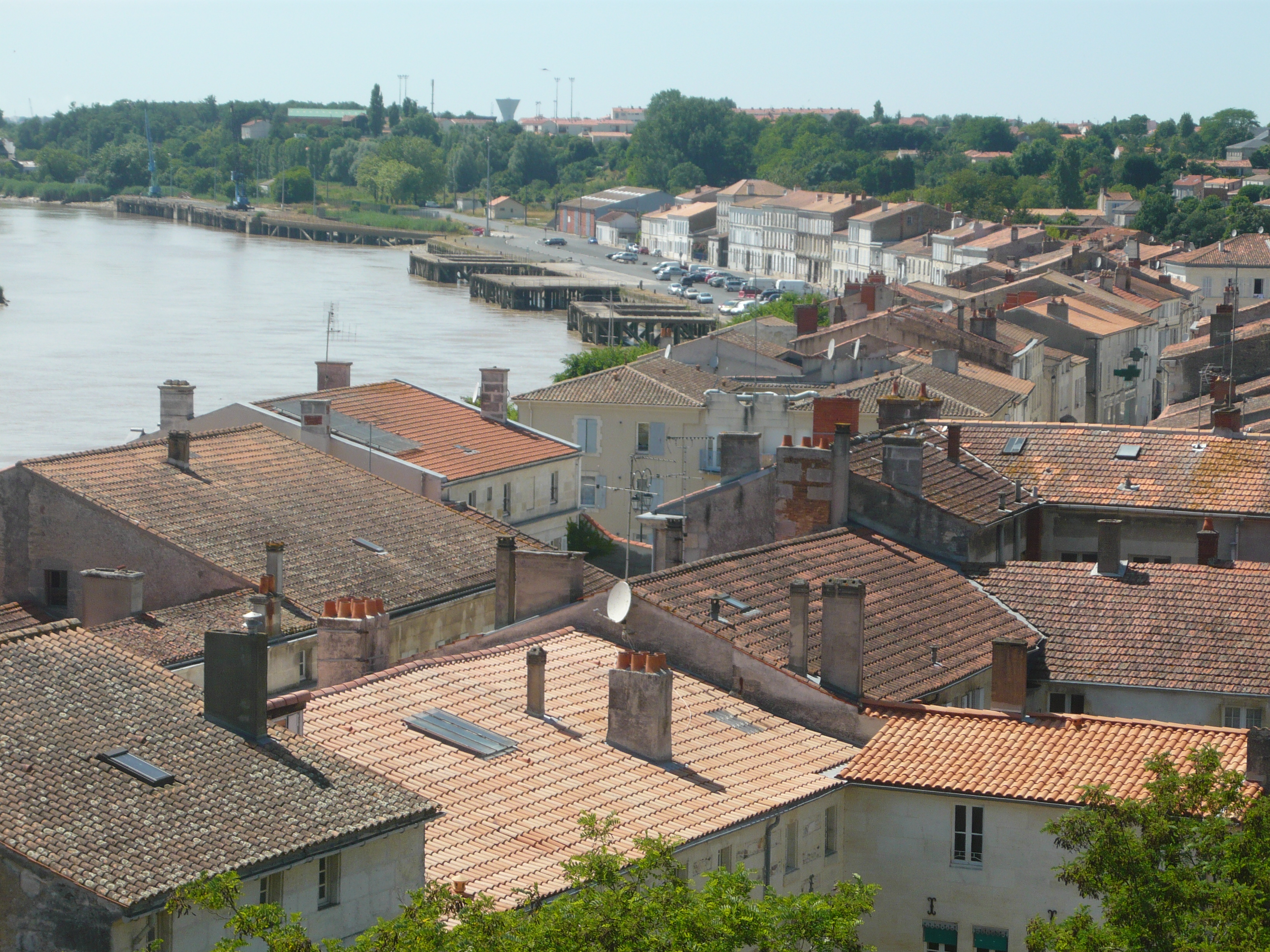 Une autre vue générale sur la ville de Tonnay-Charente depuis le pont suspendu (Charente-Maritime).